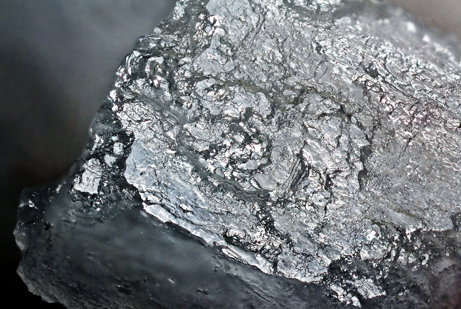 1.2 only